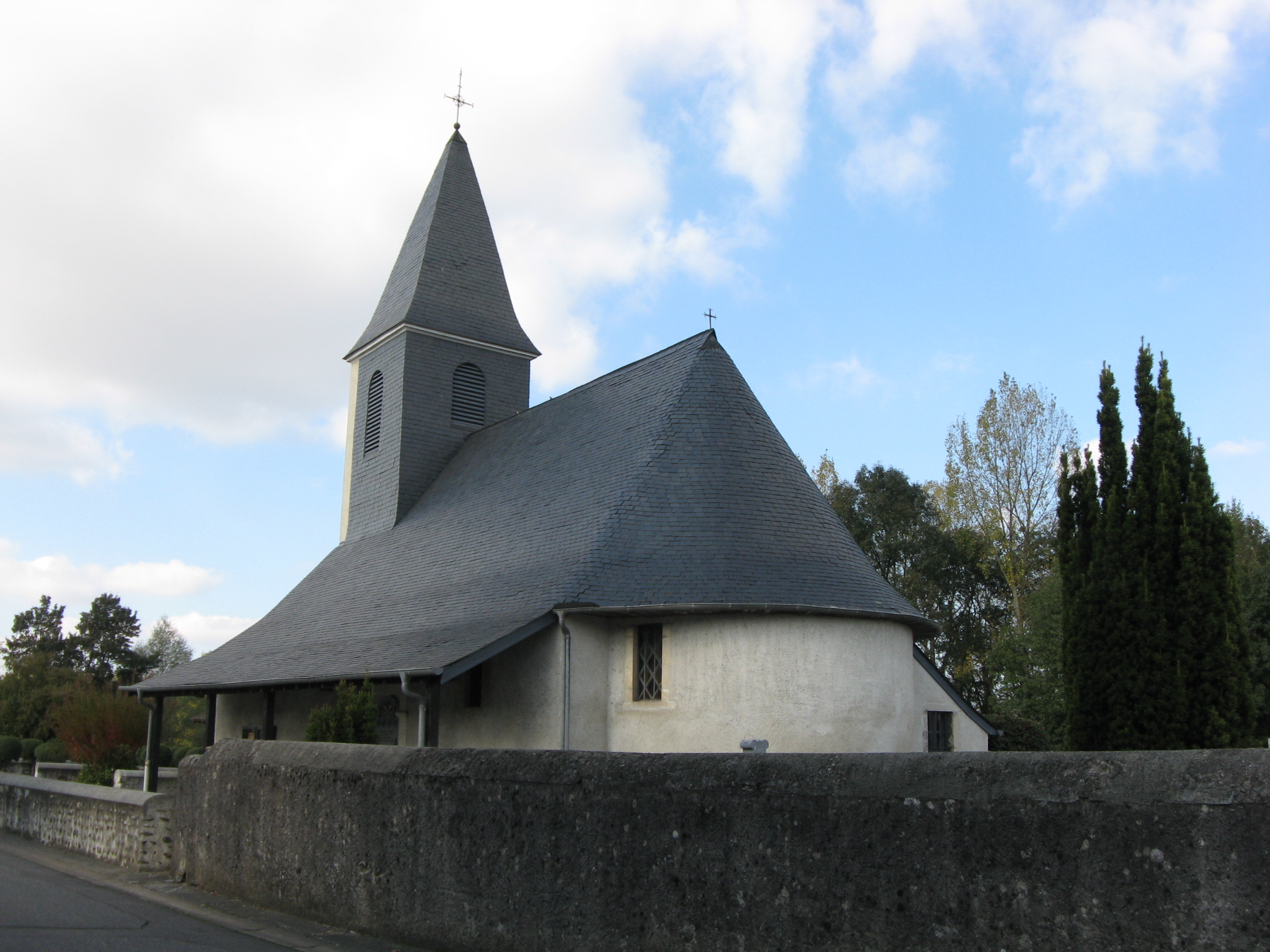 Vue de l'église d'Abidos (Pyrénées Atlantiques) Pyrénées).